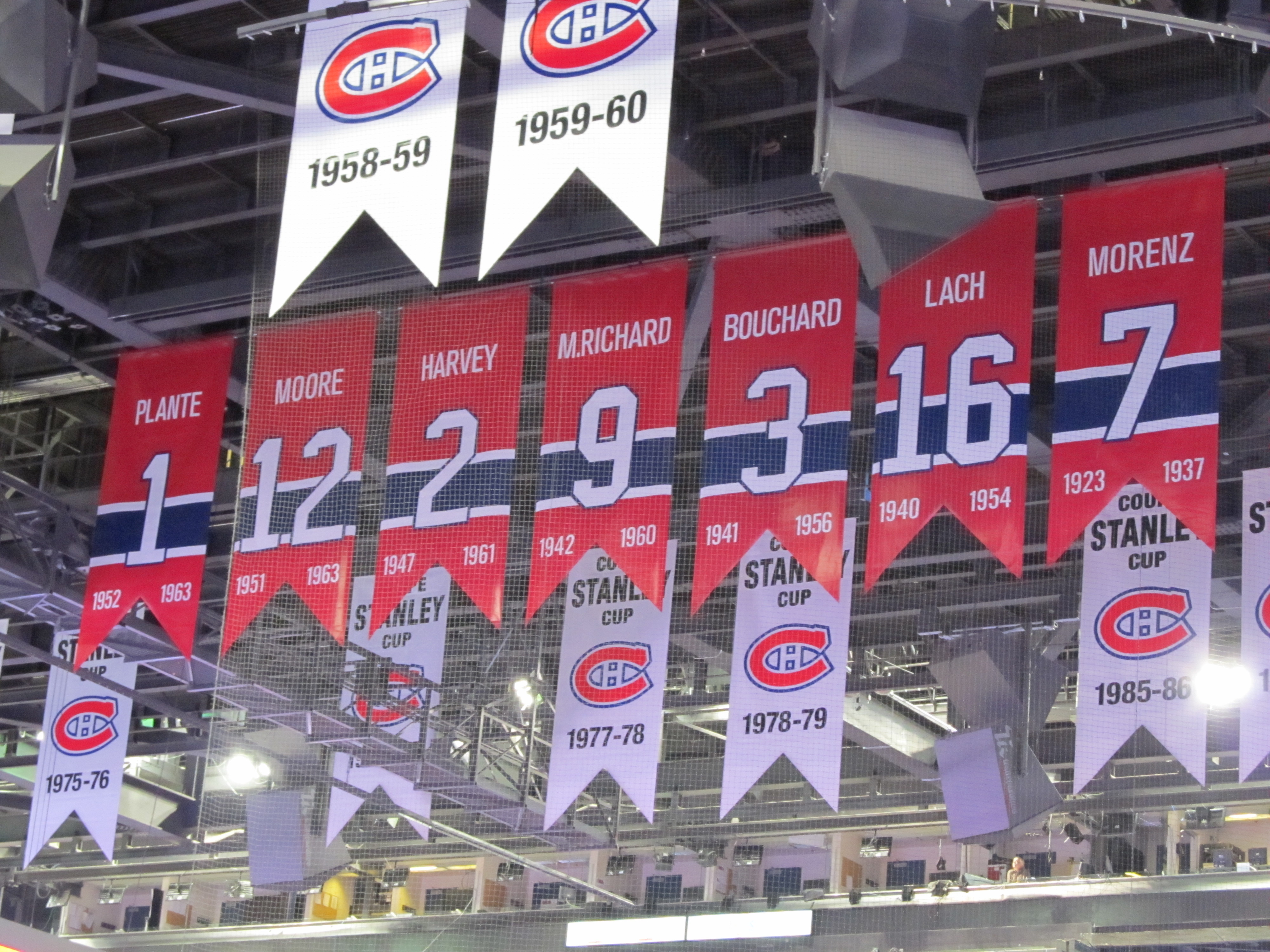 Certains chandails retirés des Canadiens de Montréal: Jacques Plante, Dickie Moore, Doug Harvey, Maurice Richard, Émile Bouchard, Elmer Lach et Howie Morenz.